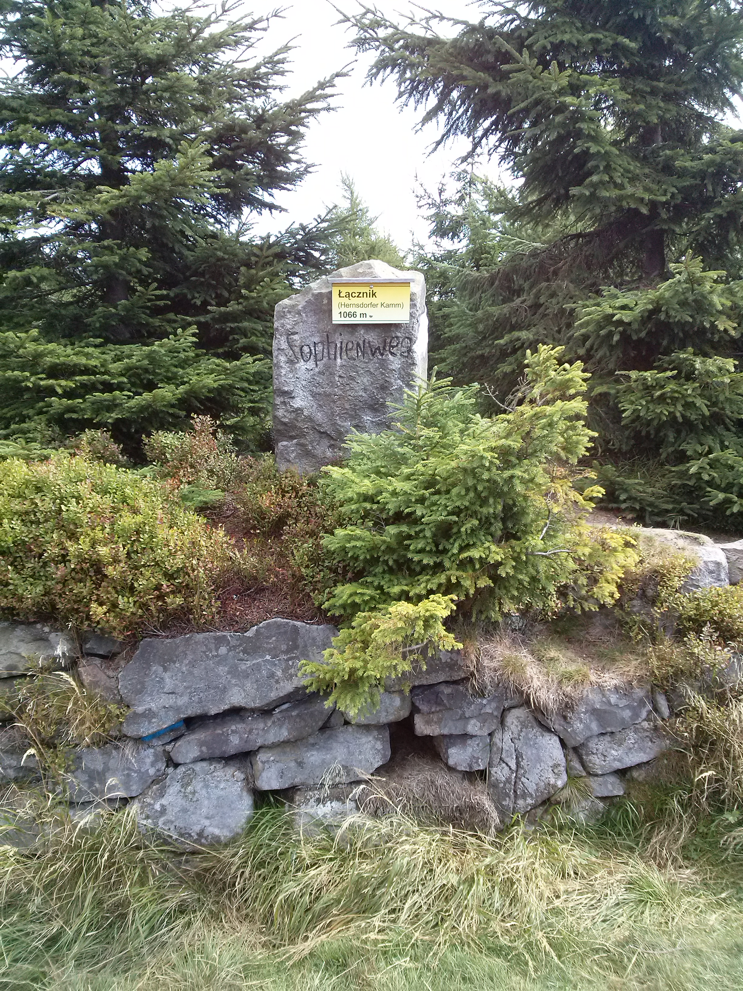 Głaz na Przełęczy Łącznik - Góry Izerskie